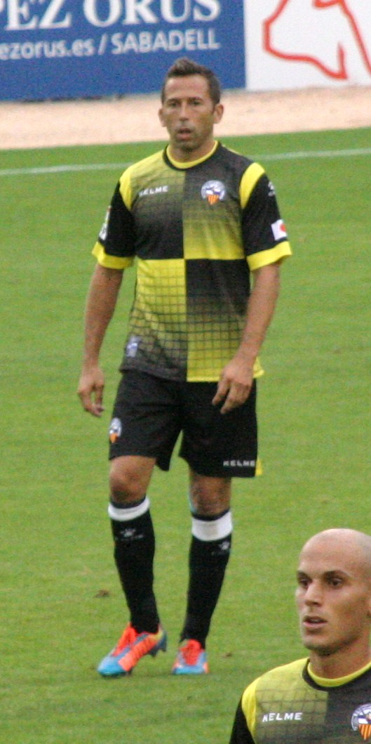 Tamudo sabadell ago 2014